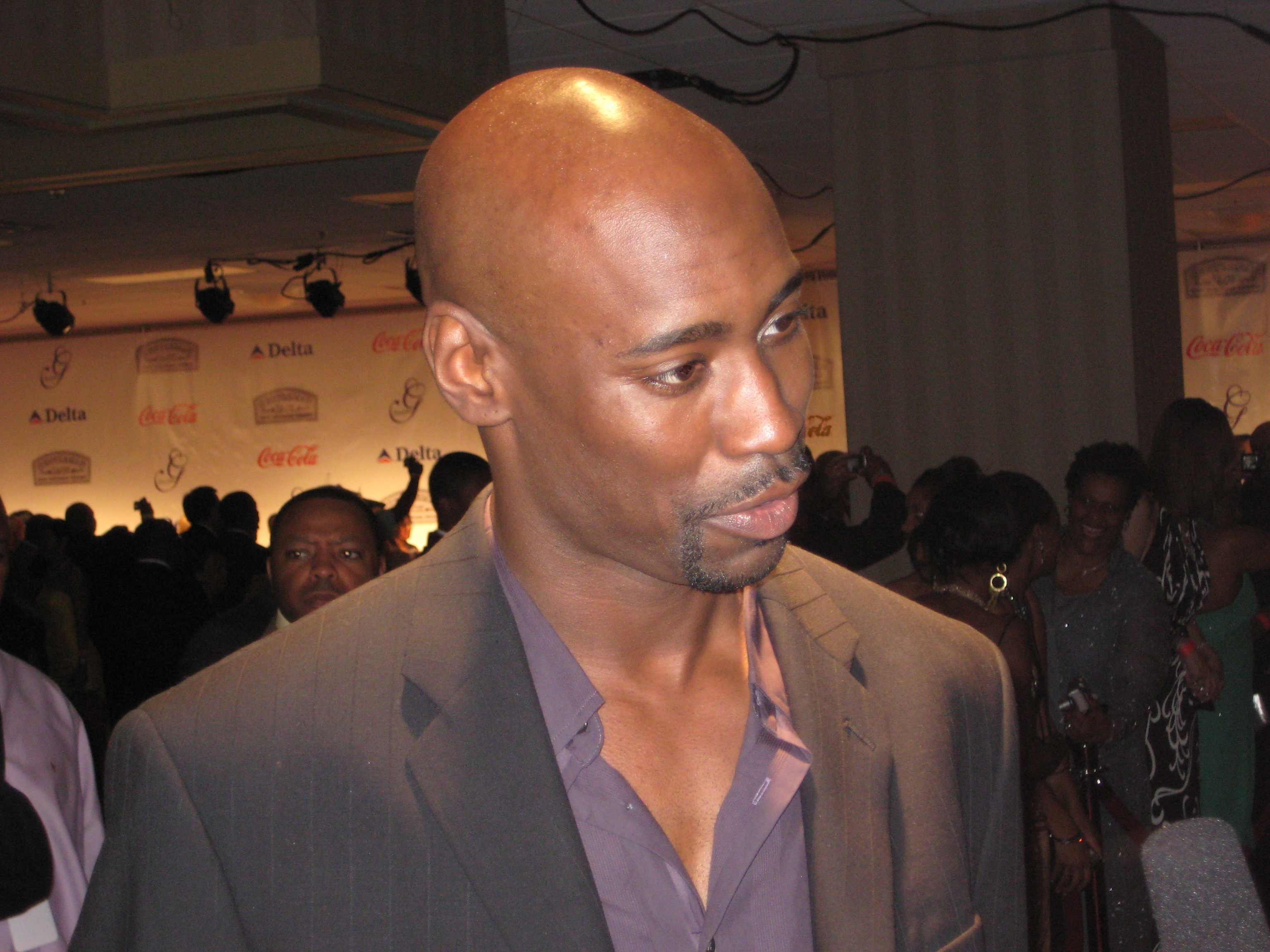 D.B. Woodside